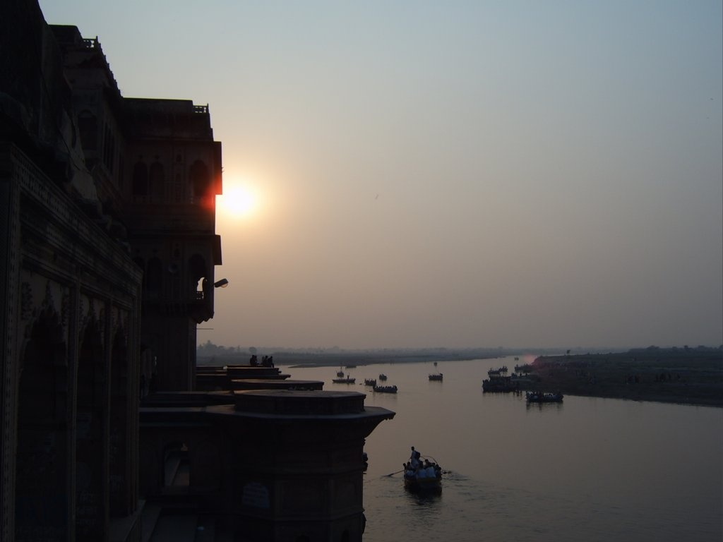 Yamuna river, Vrindavan, India